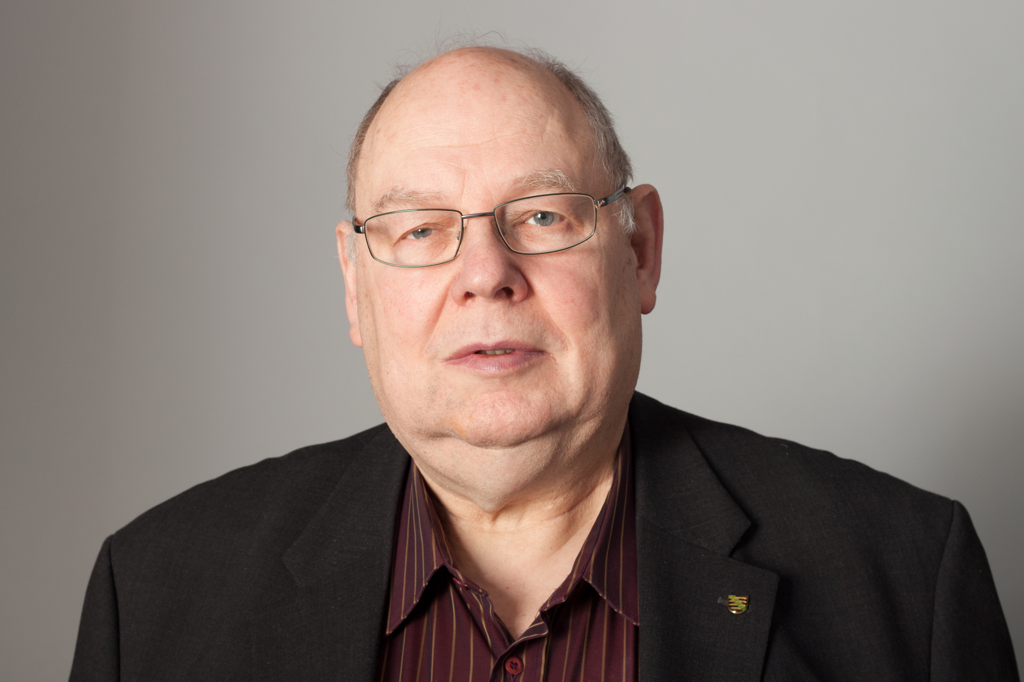 Abgeordneter des Sächsischen Landtages Karl Nolle